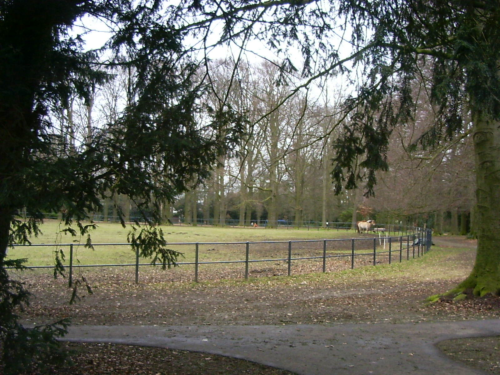 Oosterbeek, Park Bato's Wijk, paardenweide, gemeentelijk monument 112